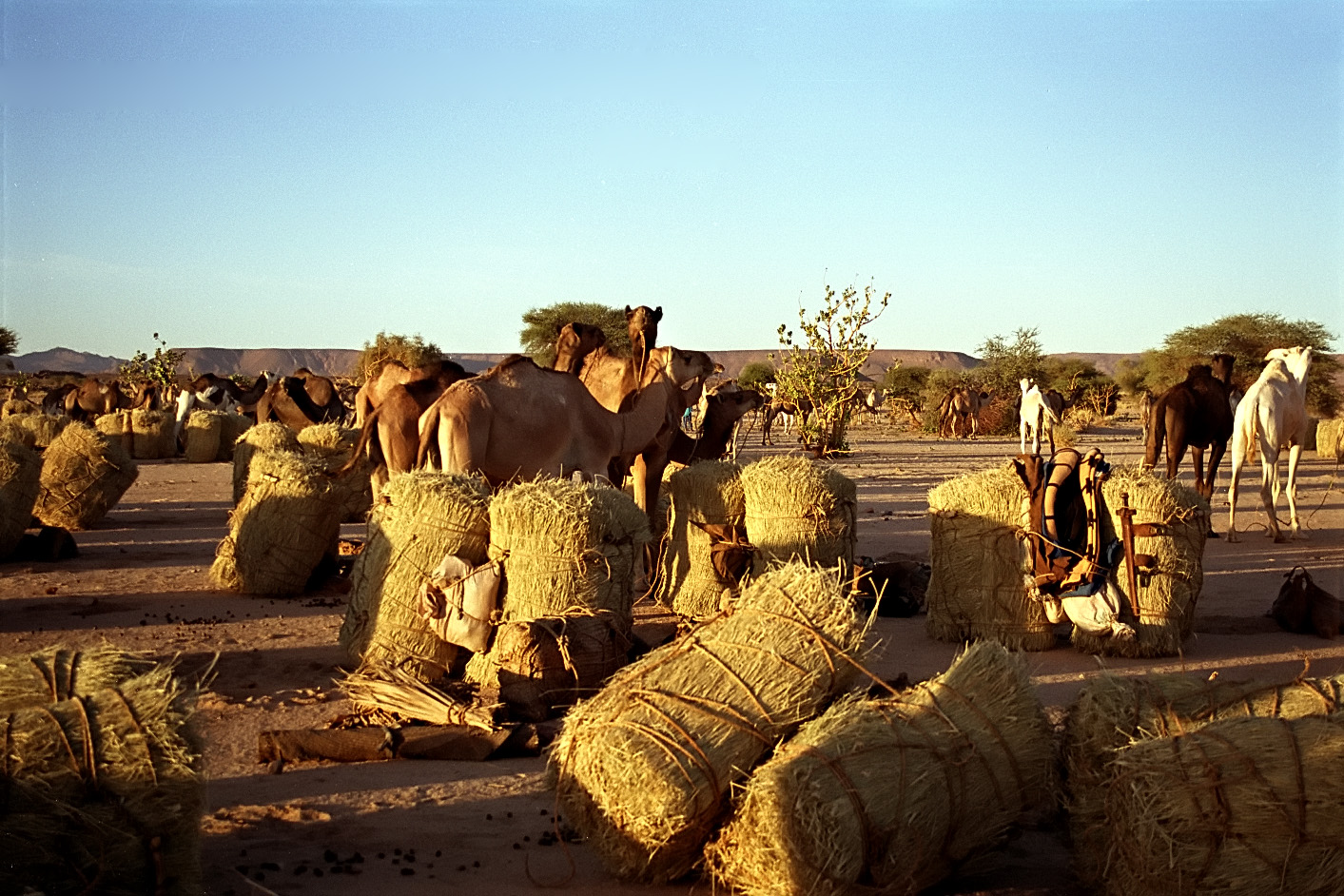 Caravane du sel au départ, dans le Massif de l'Aïr